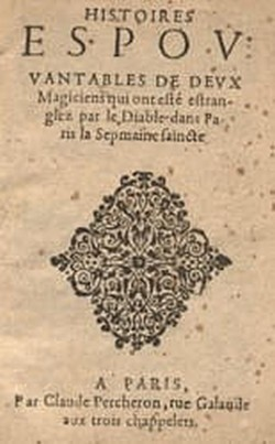 Histoires espouvantables de deux Magiciens qui ont esté étranglez par le Diable dans Paris , pendant la Sepmaine Saicnte, pet. in-8. de 15 pp.